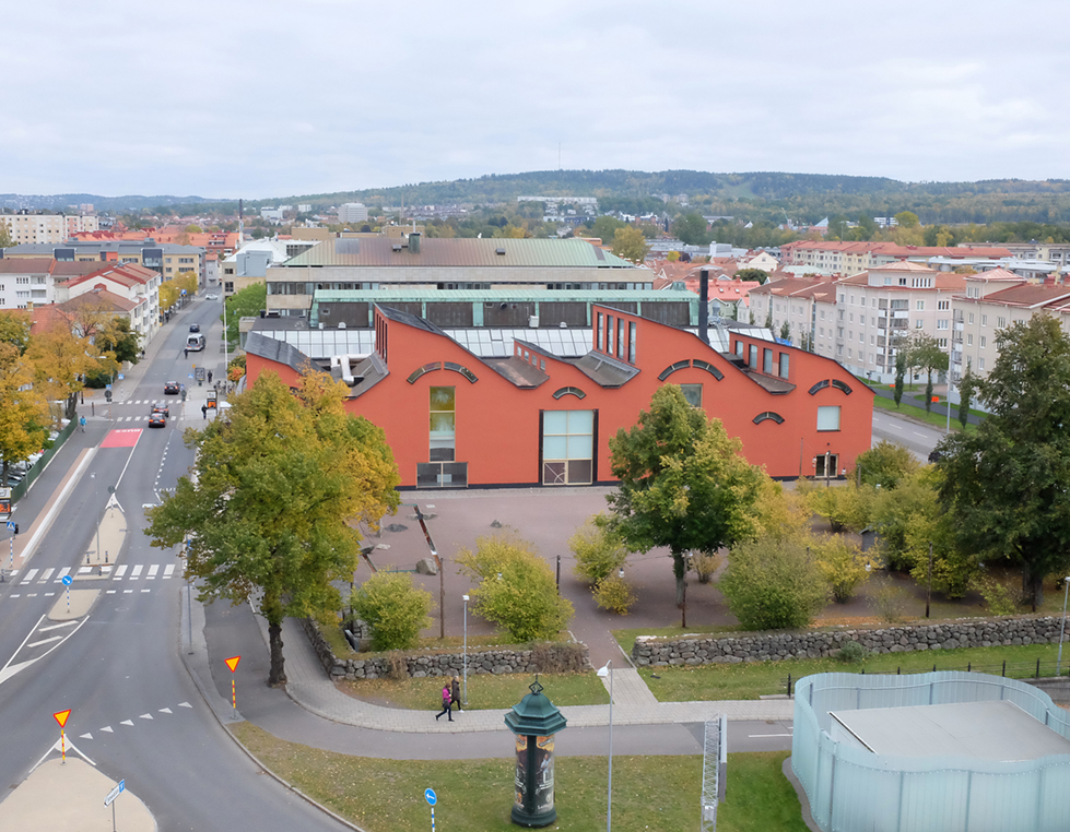 Foto på Jönköpings läns museum. Utsidan mot parken.